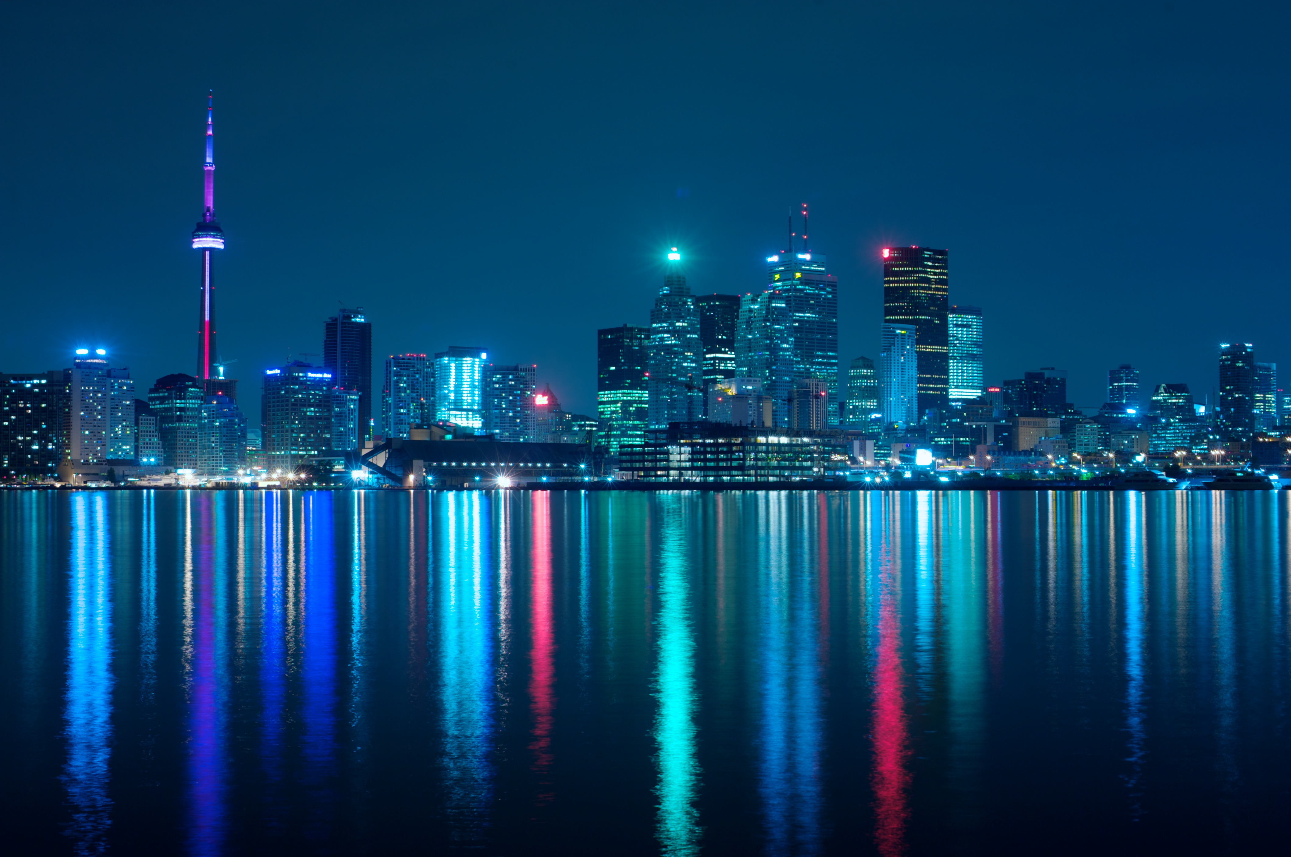 Toronto, Canada.